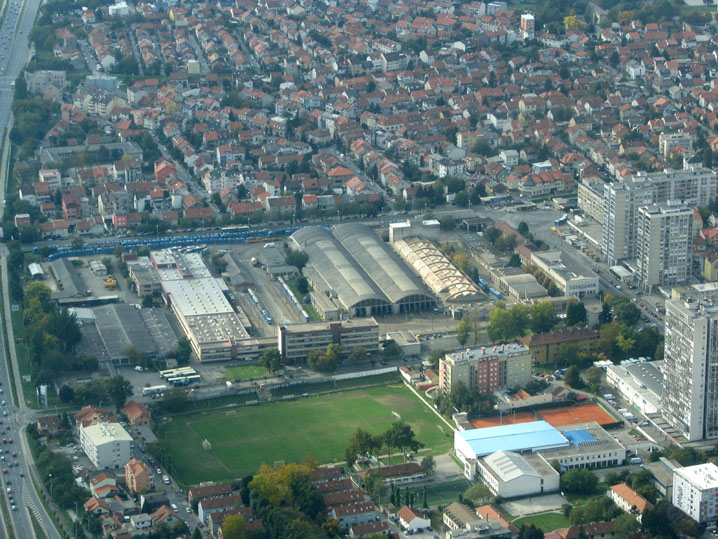 Tramvajsko spremište na Trešnjevci, Zagreb, iz zraka